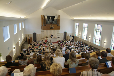 Eigen foto